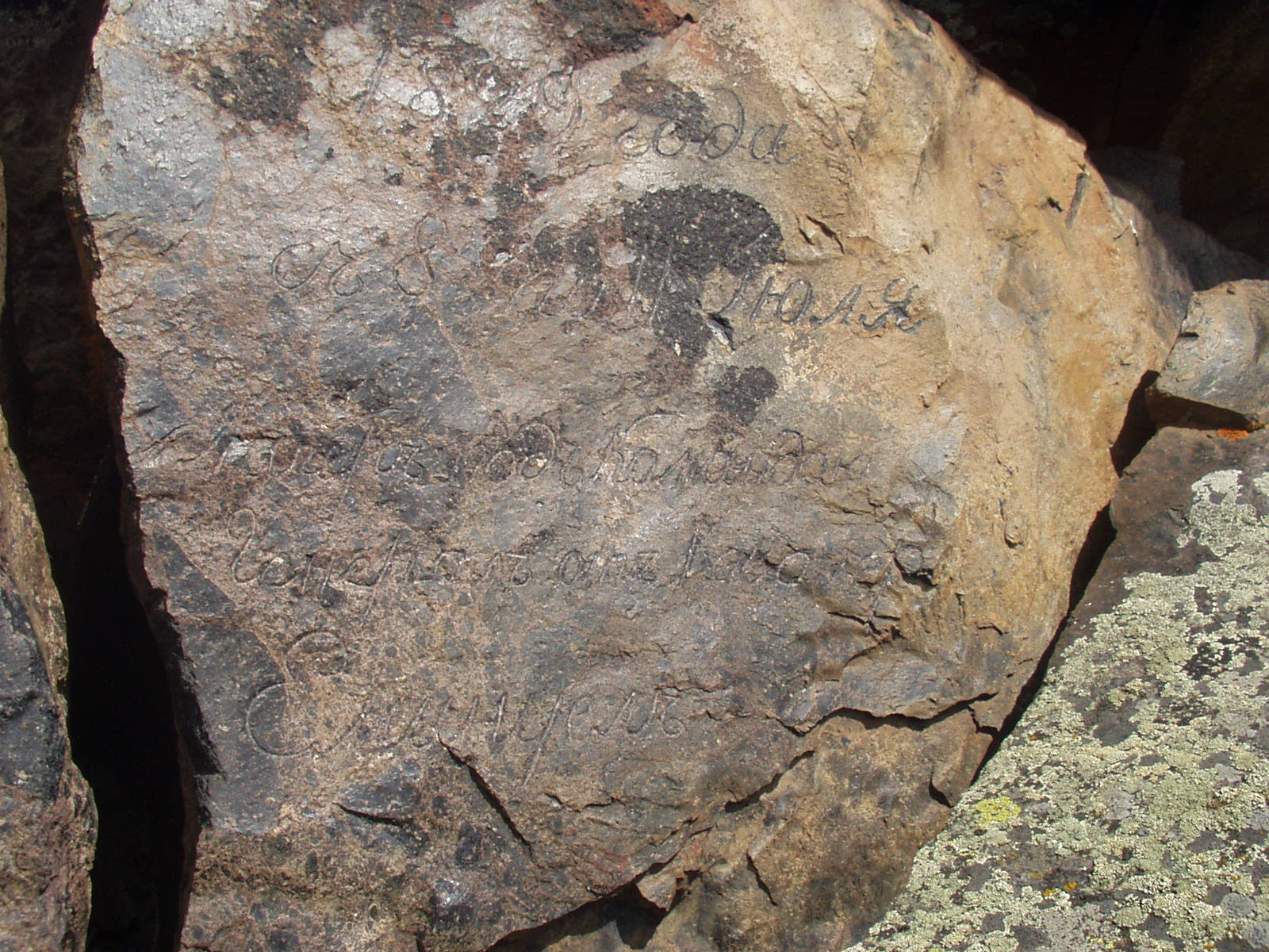 Камень генерала Эмануэля